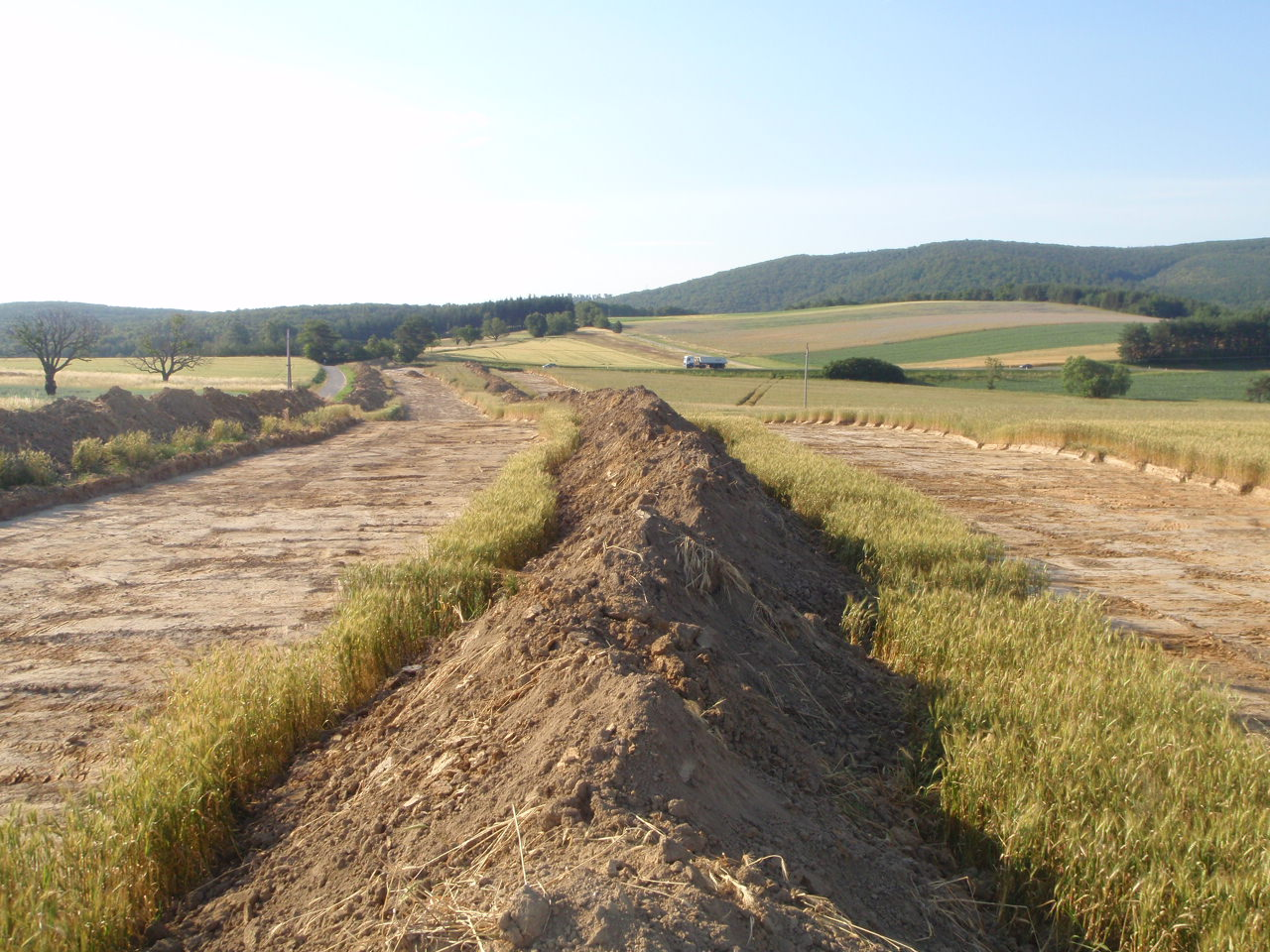 S31 tervezett autóút végcsomópont Rőtfalvánál, háttérben a Kőszegi-hegységgel